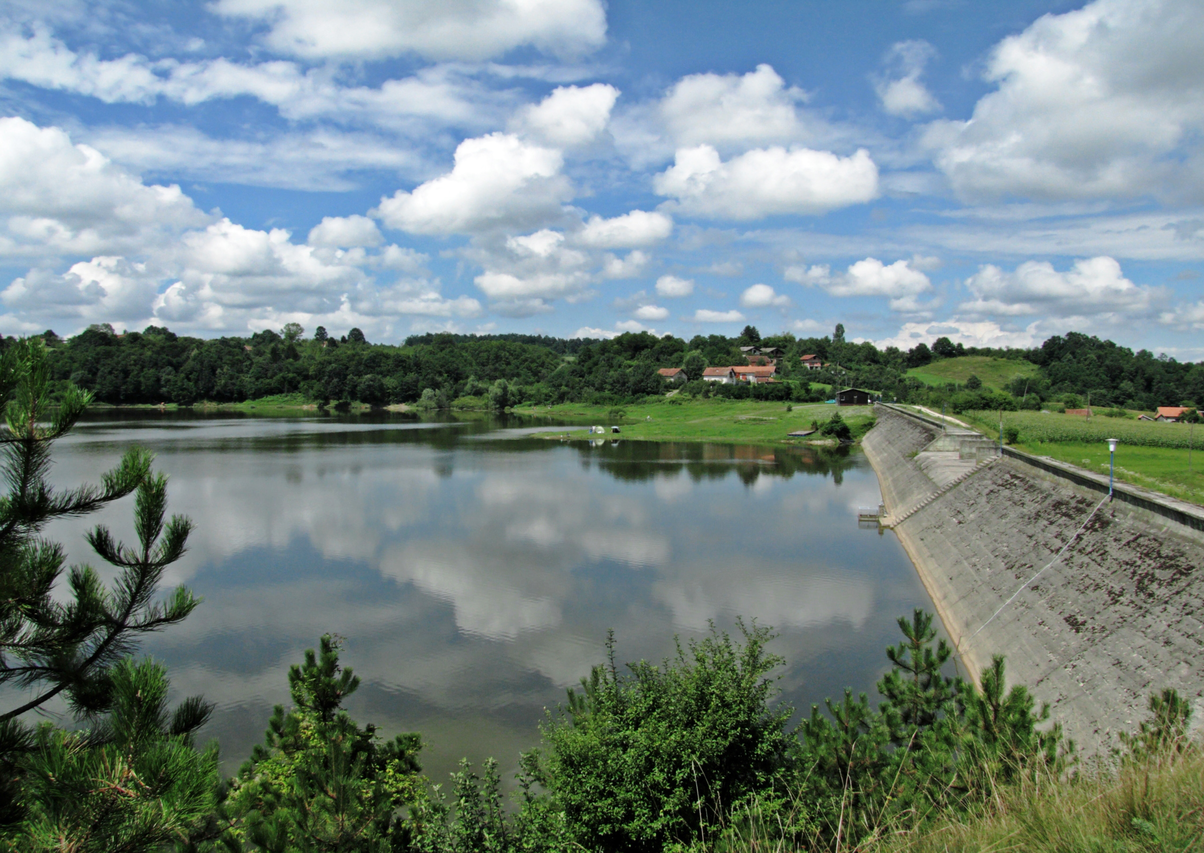 Језеро Дренова